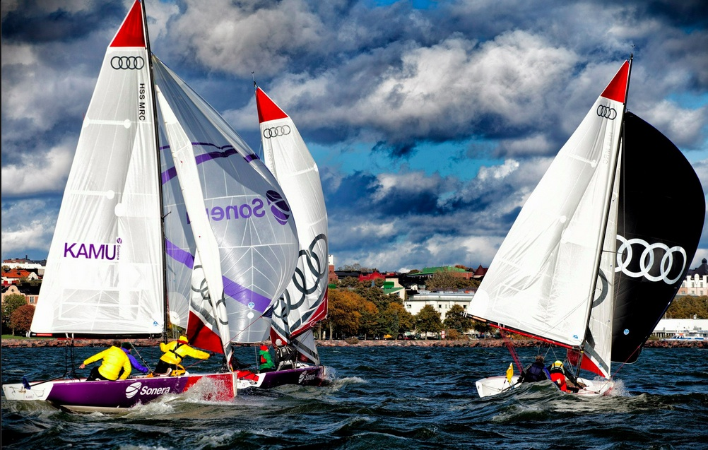 HSS Match Race med Elliott 6m båtar